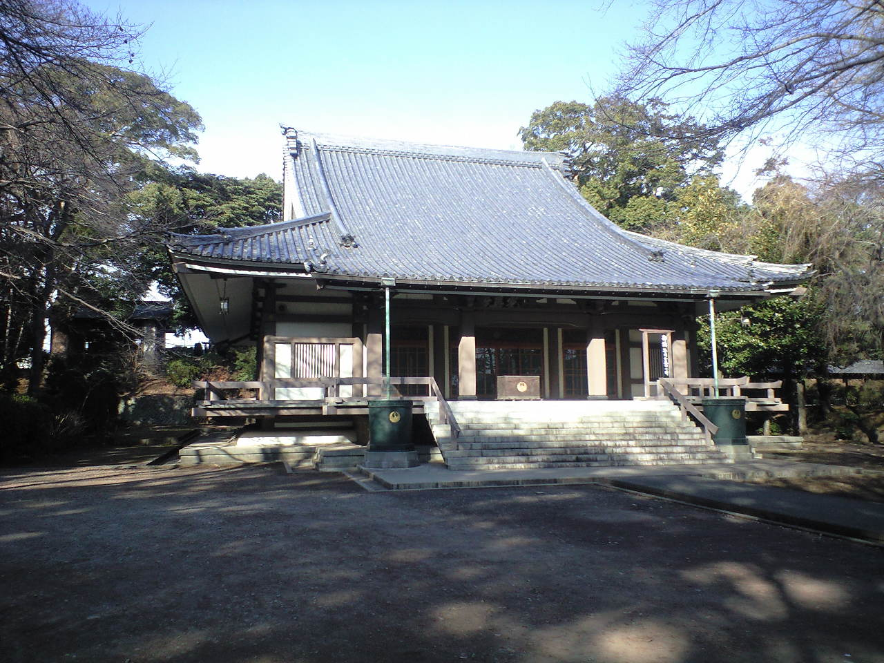 静岡県沼津市岡宮、光長寺本堂（1965年（昭和40年））